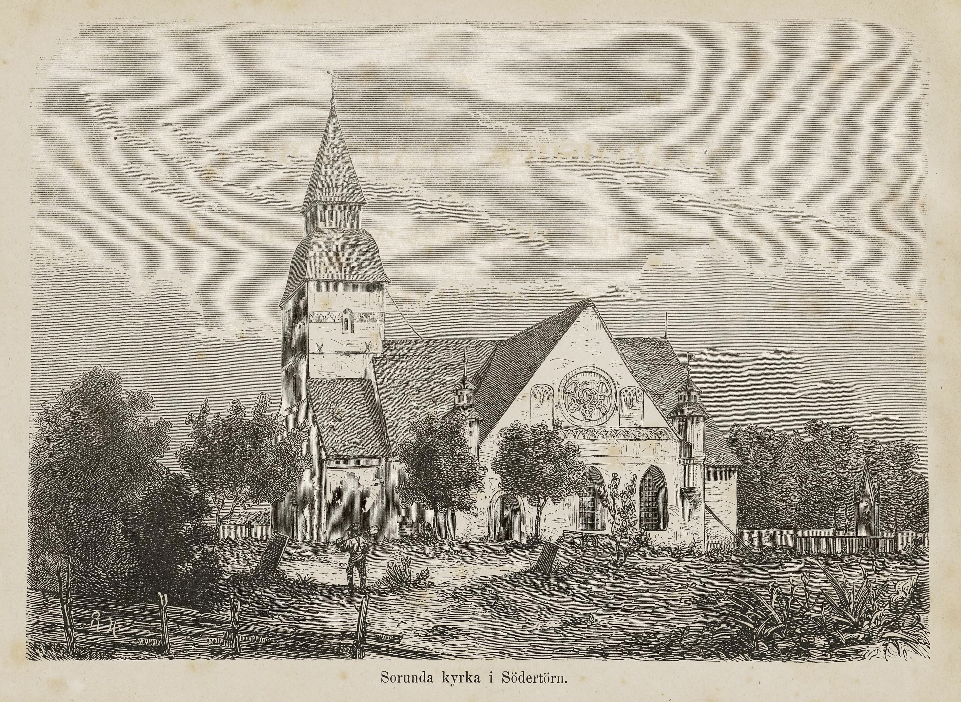 Illustrasjon hentet fra boken Nordiska taflor av ukjent forfatter og utgitt av Albert Bonnier (se, 1873)